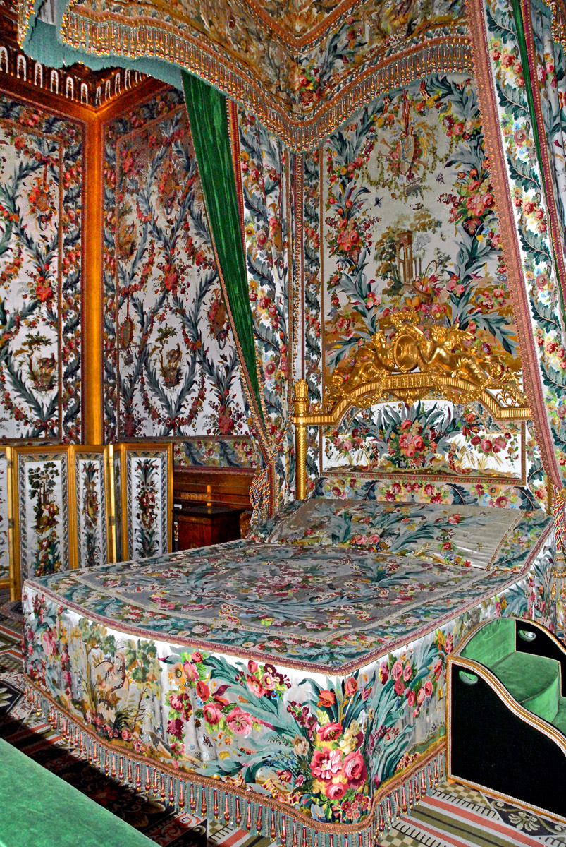 Château de Fontainebleau, France. Lit de la Chambre de l'Impératrice, détail. Depuis la Reine Marie de Médicis jusqu'à l'Impératrice Eugénie, toutes les souveraines occupèrent cette chambre. Le décor actuel correspond à différentes époques. Le mobilier est celui que connut l'Impératrice Joséphine. Le lit (1787) fut exécuté par Sené et Laurent (sous la direction d'Hauré) pour Marie-Antoinette qui n'eut pas le temps de l'utiliser. La soierie des murs et du mobilier a été retissée à Lyon de 1968 à 1986 d'après les modèles du 18ème siècle. Le château de Fontainebleau offre le souvenir de plus de 700 ans de présence des souverains de France, de l’intronisation de Louis VII en 1137 à la chute du Second Empire en 1870.